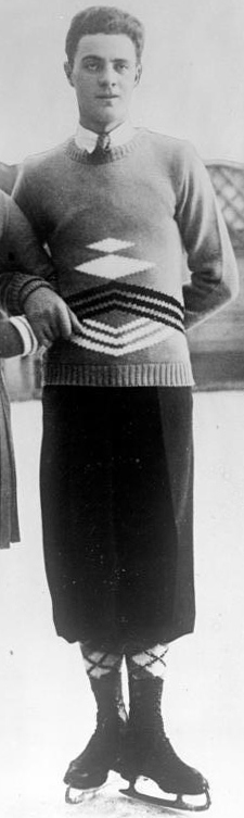 Die besten Eiskunstläufer der Welt ! Die Weltmeisterin im Eiskunstlauf Sonja Henie, Oslo, und der Weltmeister Carl Schäfer, Wien, errangen auf der Winter-Olympiade in Lake Placid die goldene Medaille und damit den Weltmeistertitel im Eiskunstlauf.